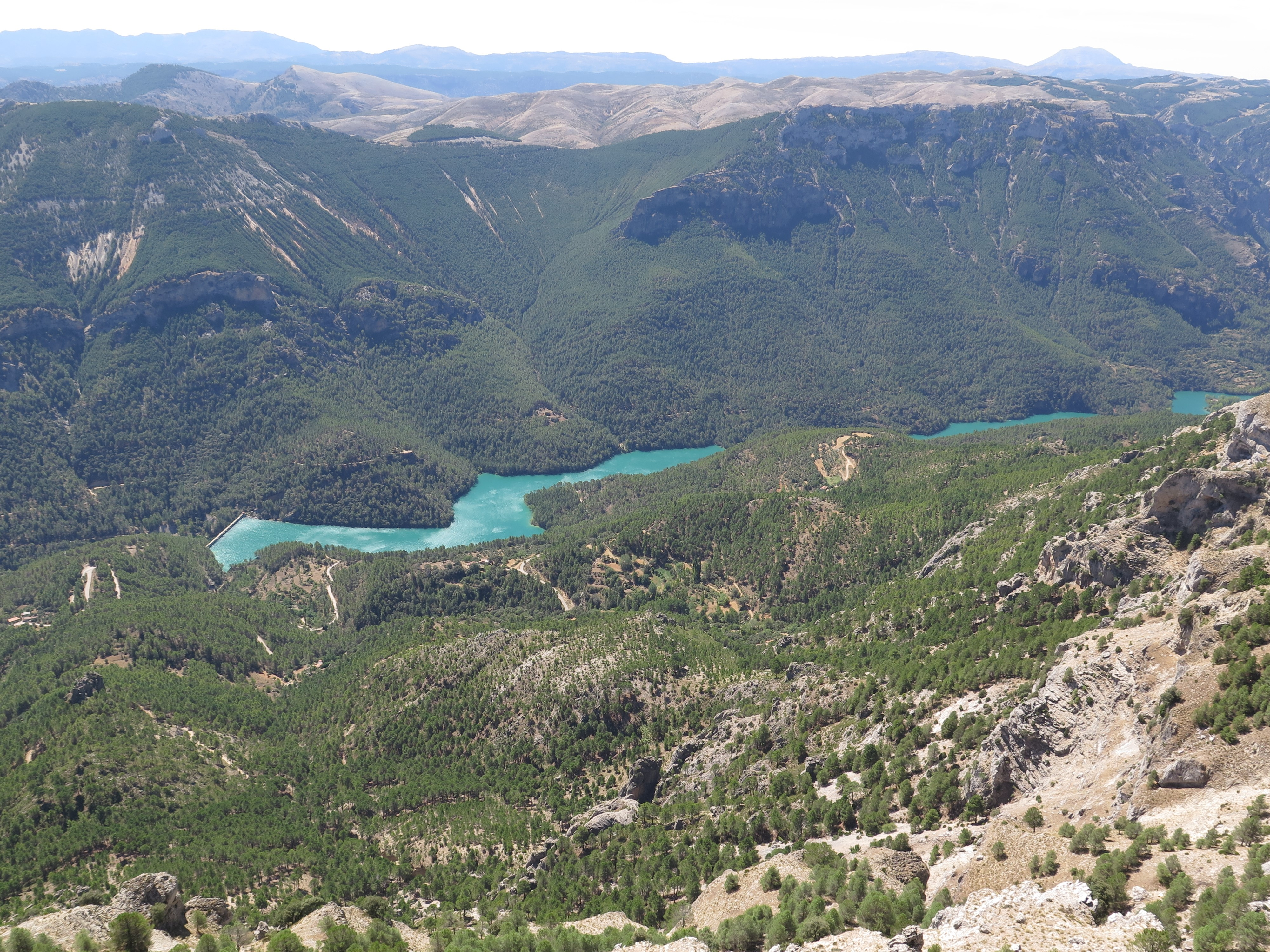 El embalse del Anchuricas, visto desde el Puntal de la Misa